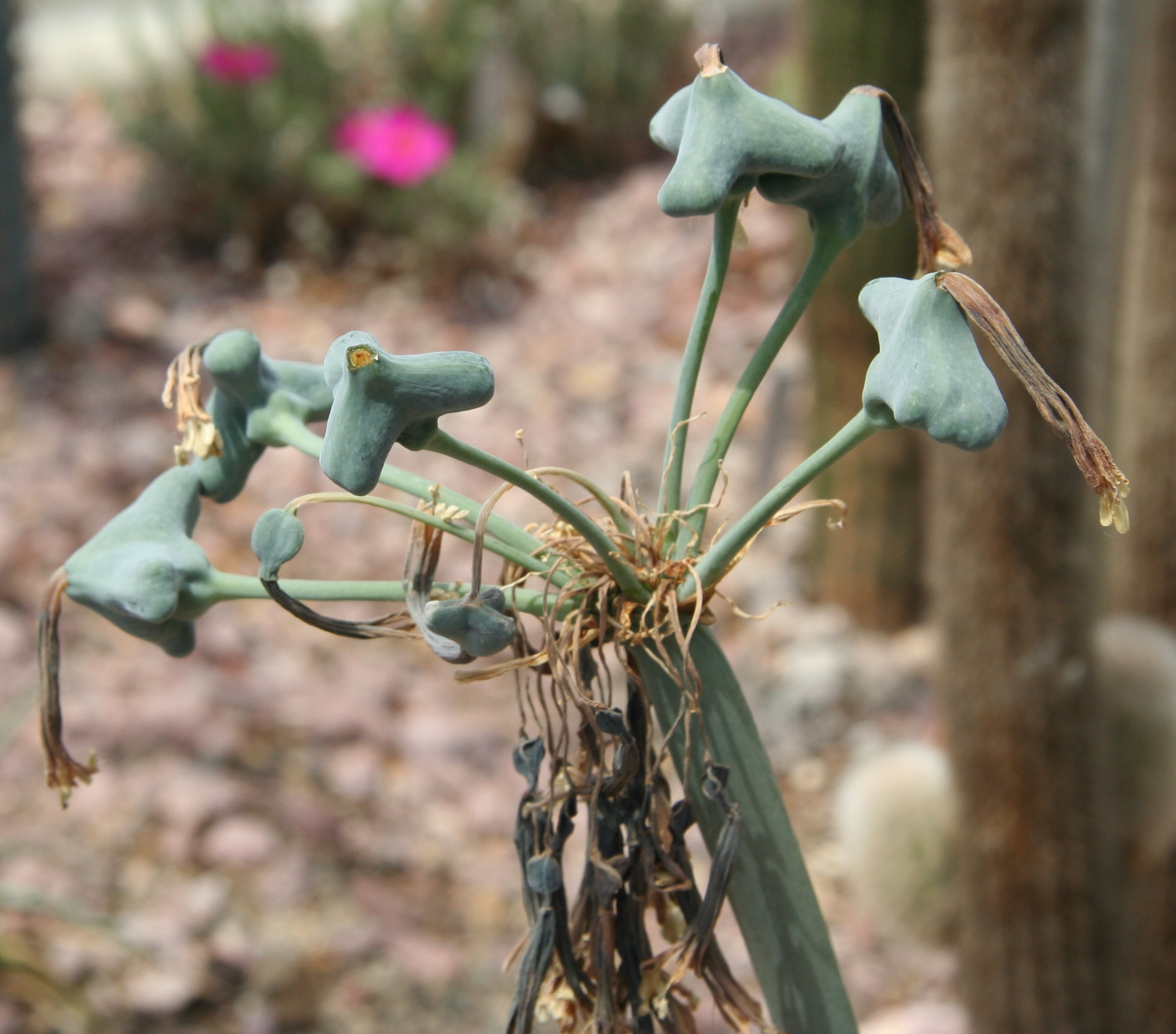 Früchte an Rauhia peruviana in der Sukkulenten-Sammlung Zürich